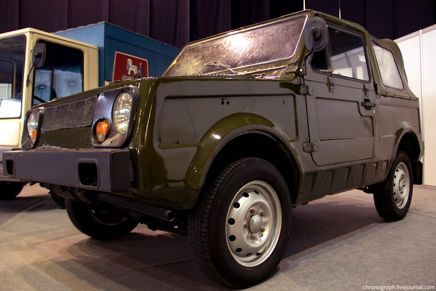 ВАЗ 2122 "Река" Автомобиль-амфибия. Тольяттинский автосалон 2012